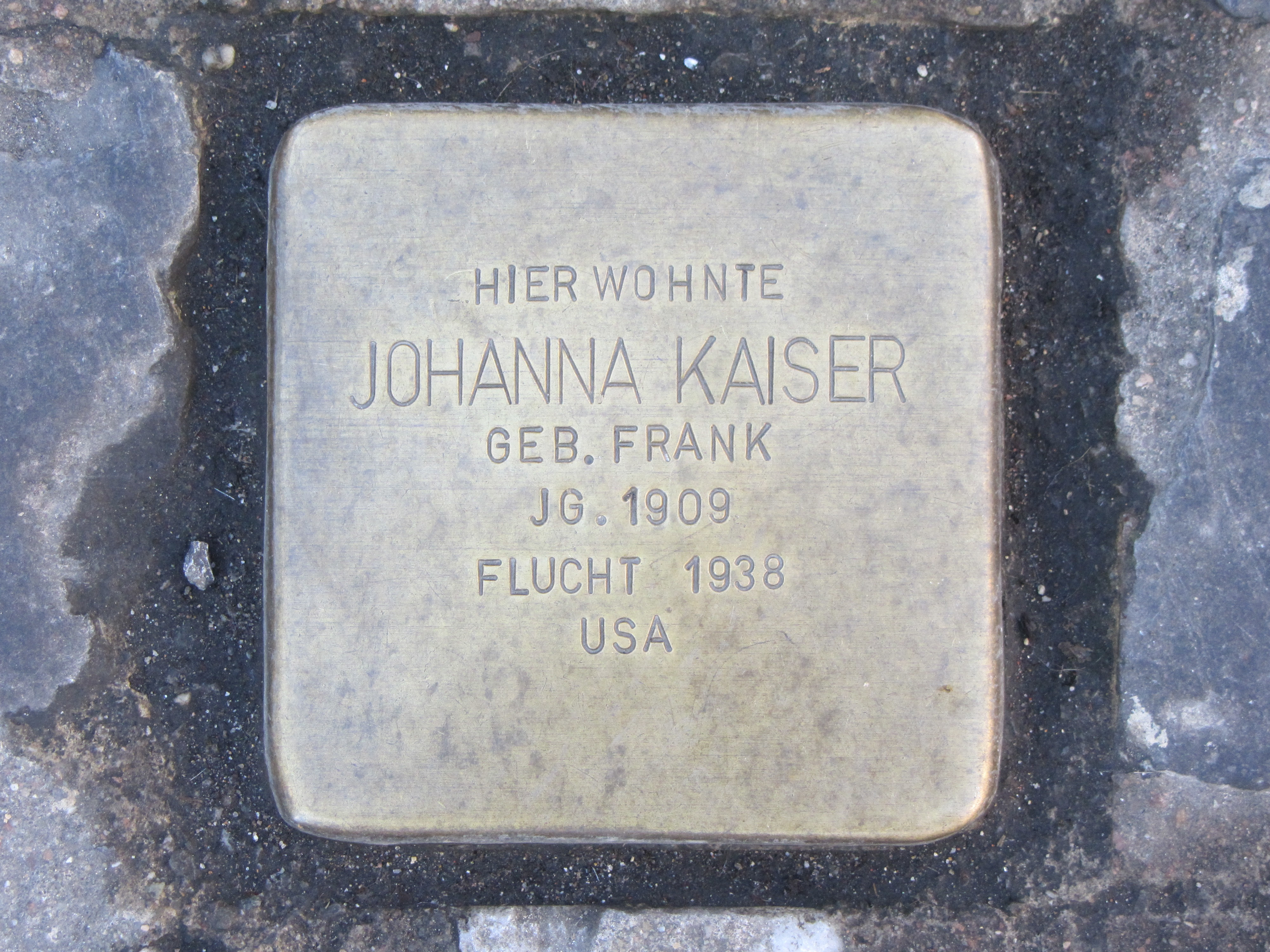 der Stolperstein für Johanna Kaiser vor dem Haus Scheffelstraße 15 in Singen